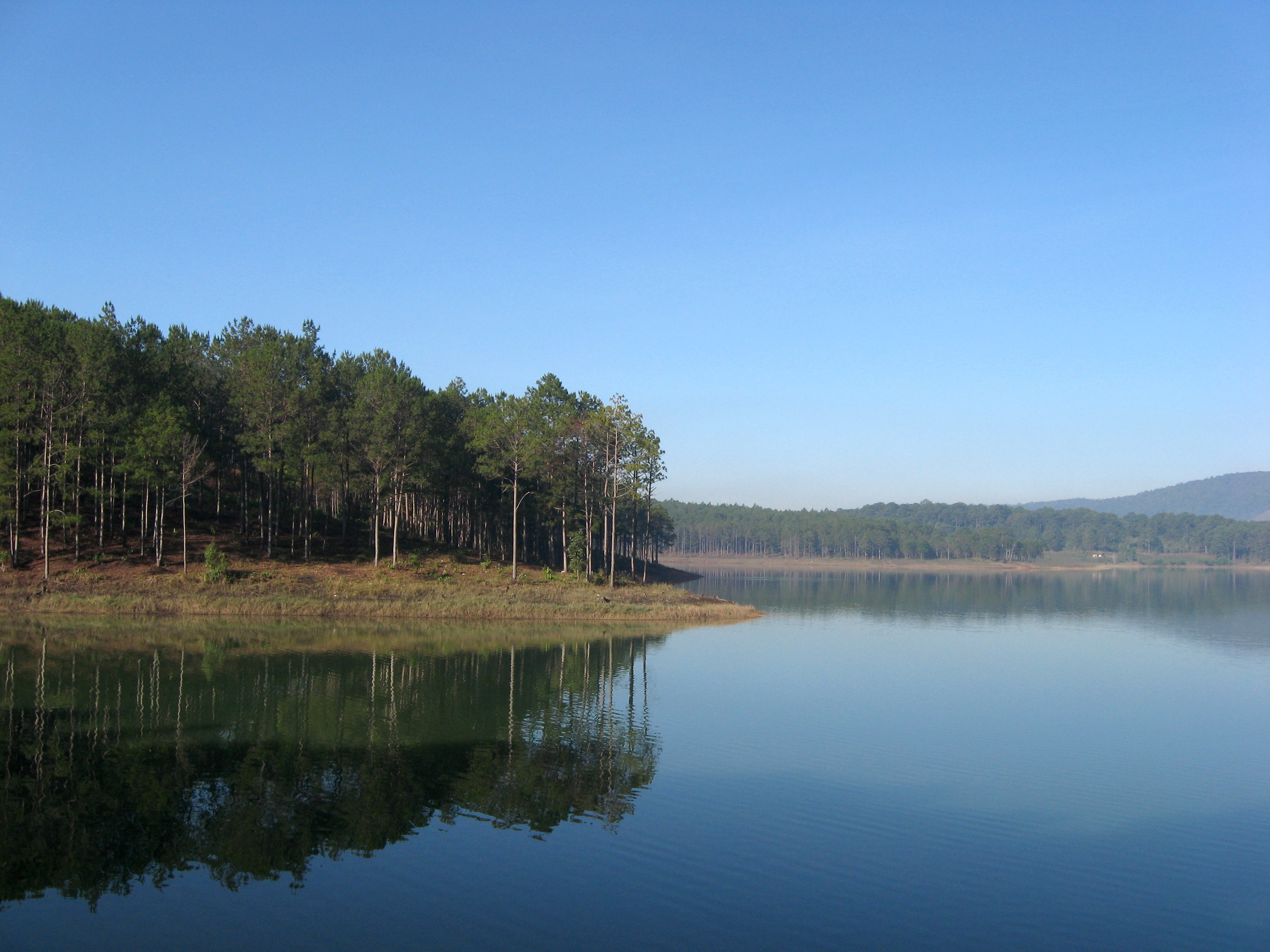 Tuyen Lam Lake, Da Lat